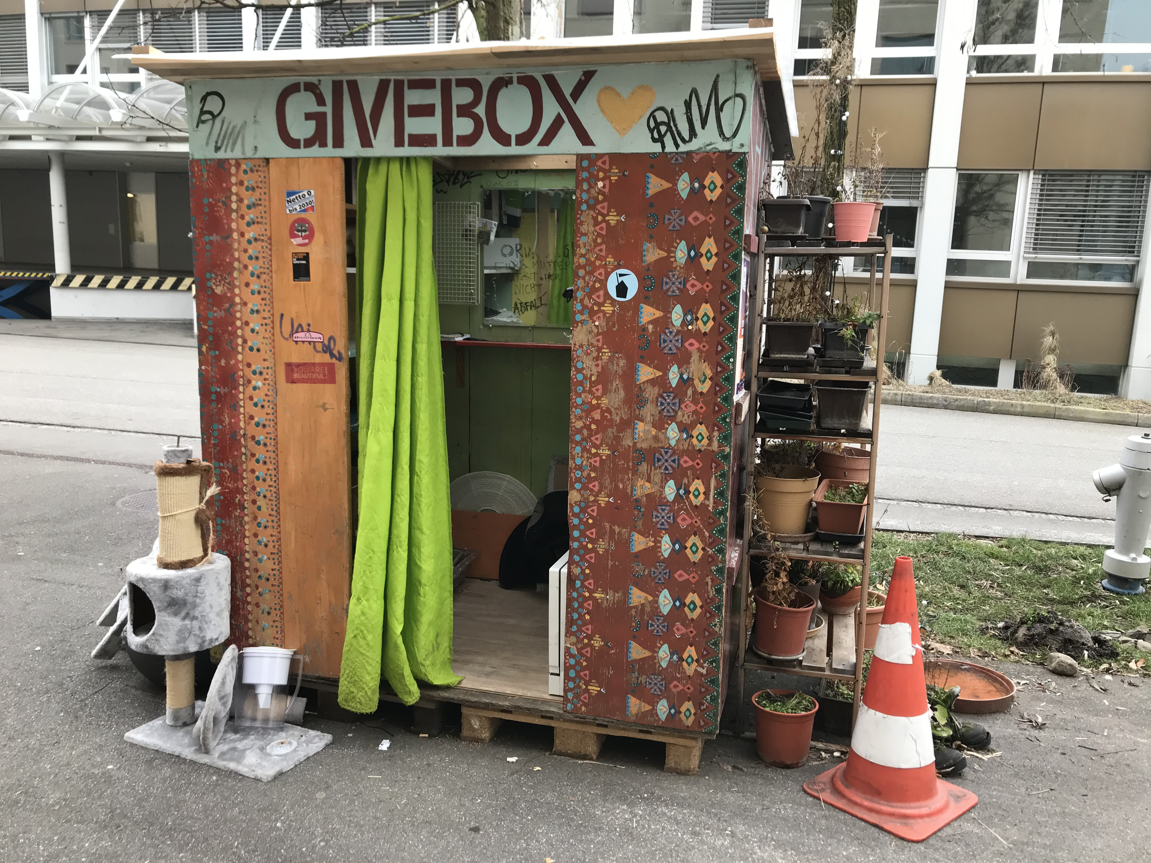 Eine kleine Hütte zum kostenlosen Tauschen von Waren.